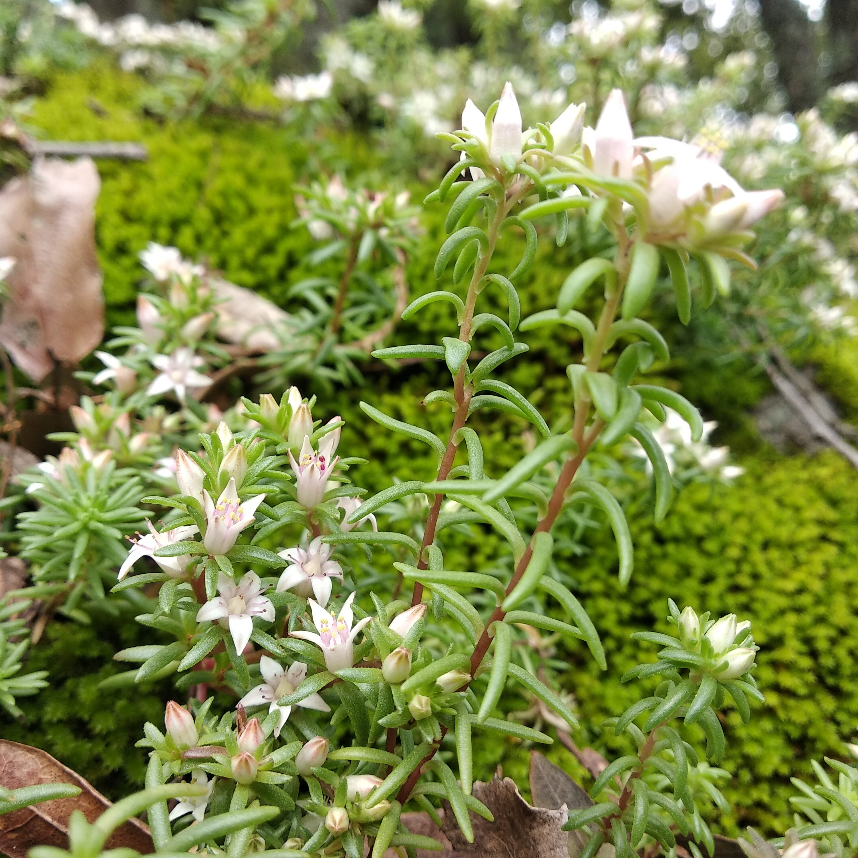 Sedum goldmanii es una hierba suculenta endémica del Eje Neovolcánico de México.